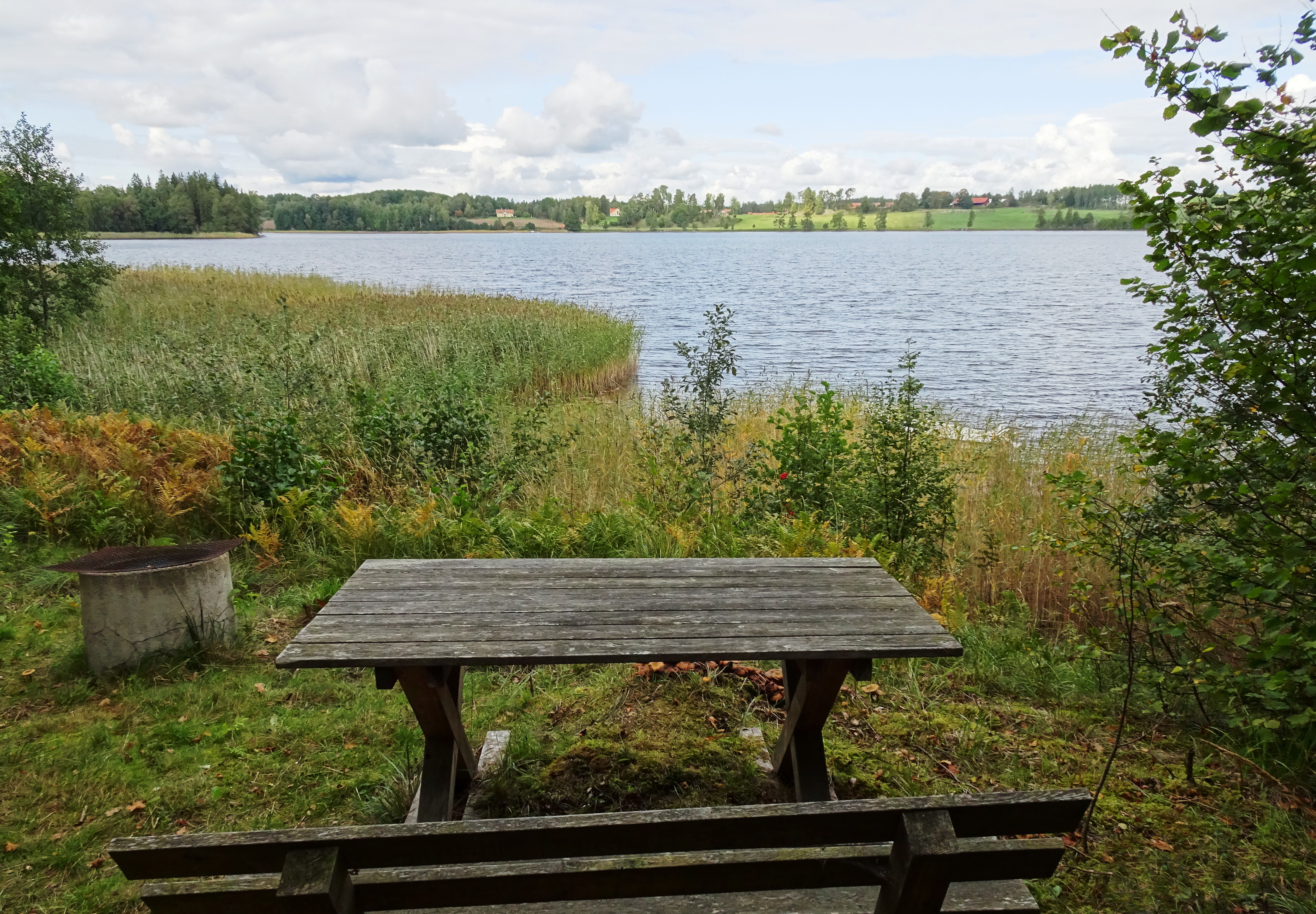 Sjön Misteln från sydväst vid rastplatsen för Nytorpsravinen.